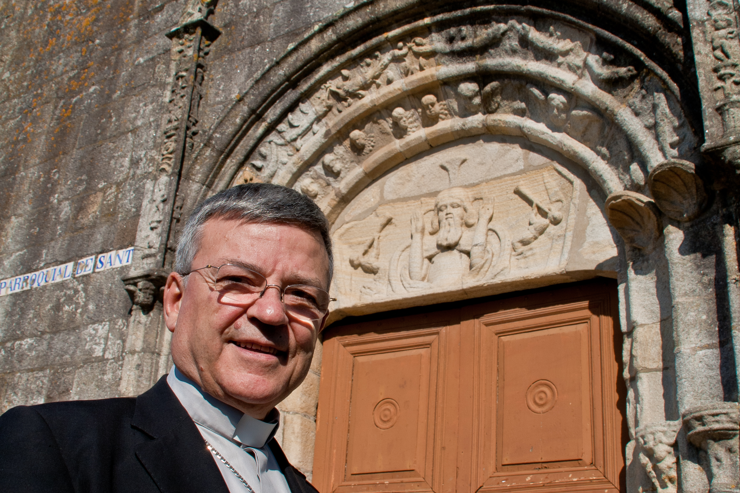 Santiago Agrelo Martínez, arzobispo de Tánger